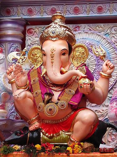 Ganeshotsav in Maharashtra